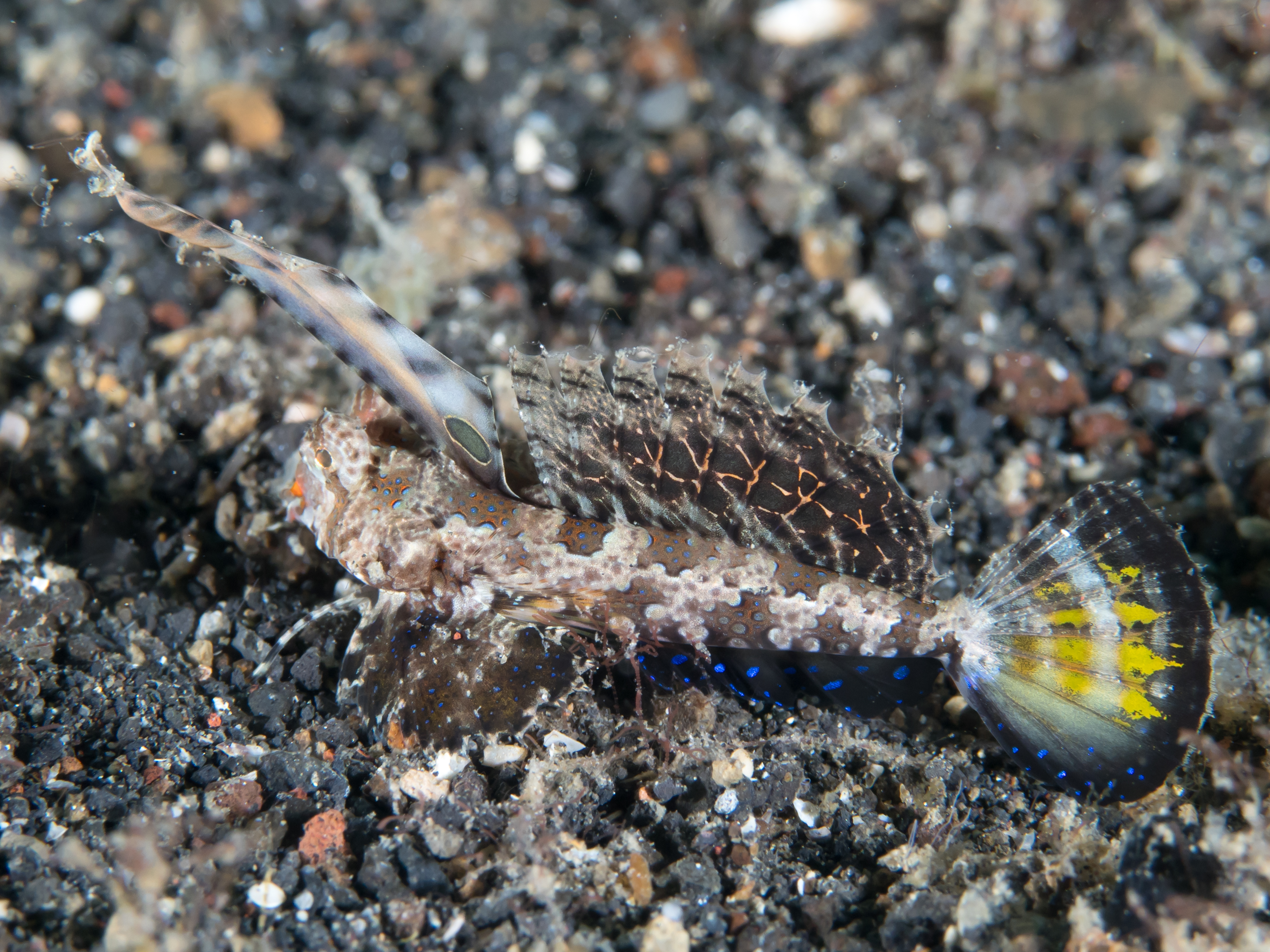 Lembeh, Indonesia - Orange-black dragonet (Dactylopus kuiteri)